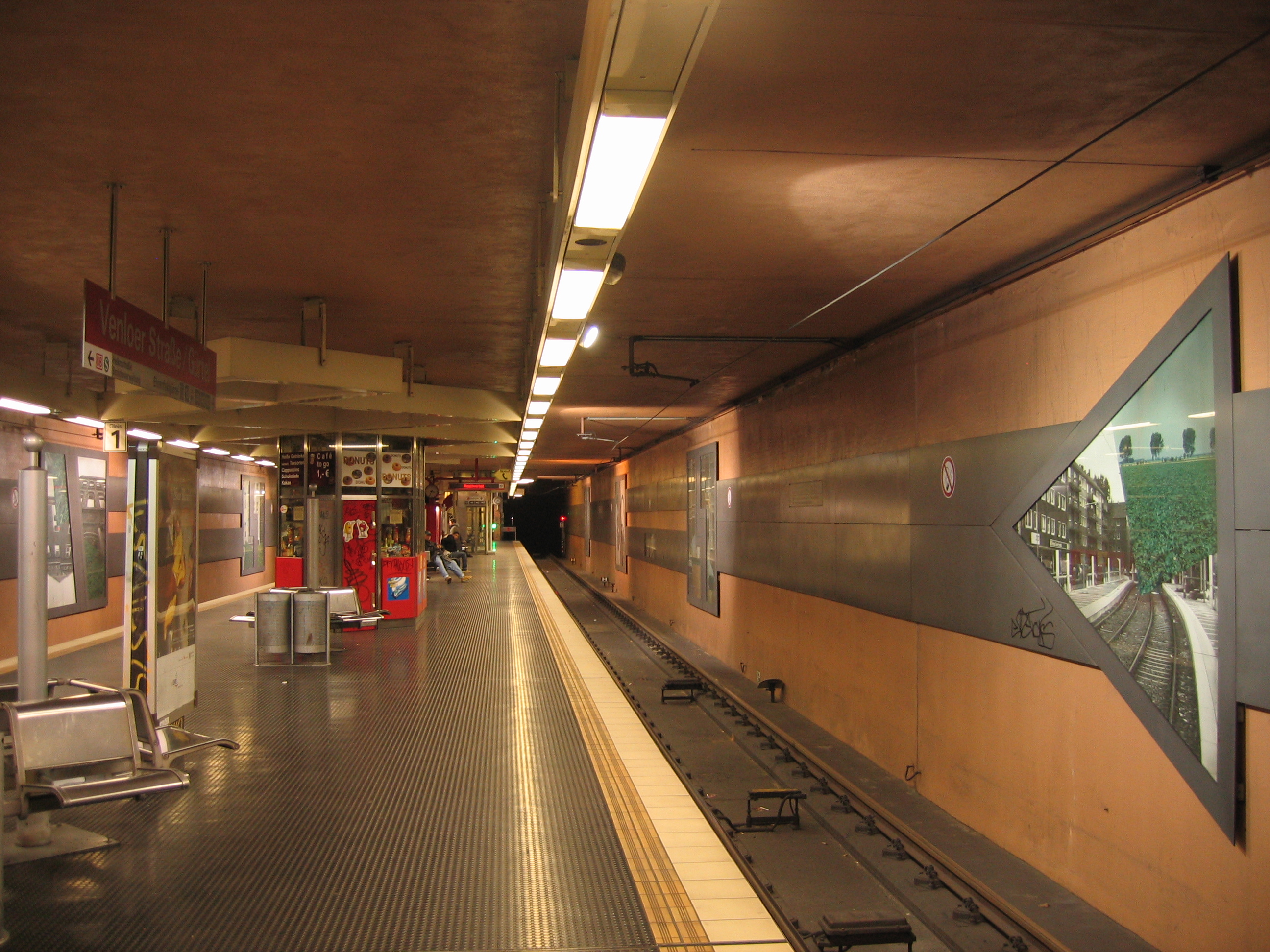 U-Bahn-Station Venloer Str./Gürtel der Stadtbahn Köln